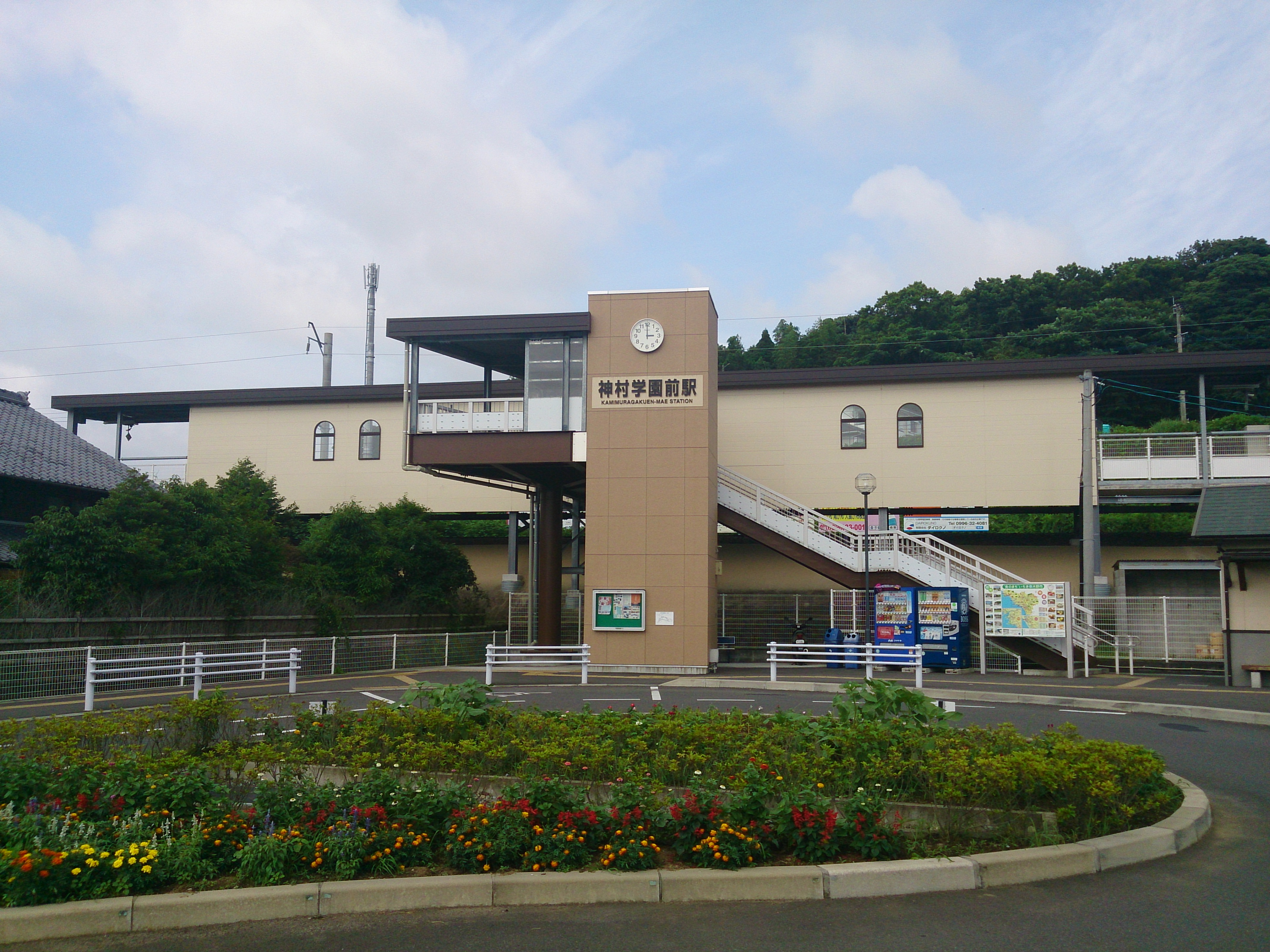 神村学園前駅外観